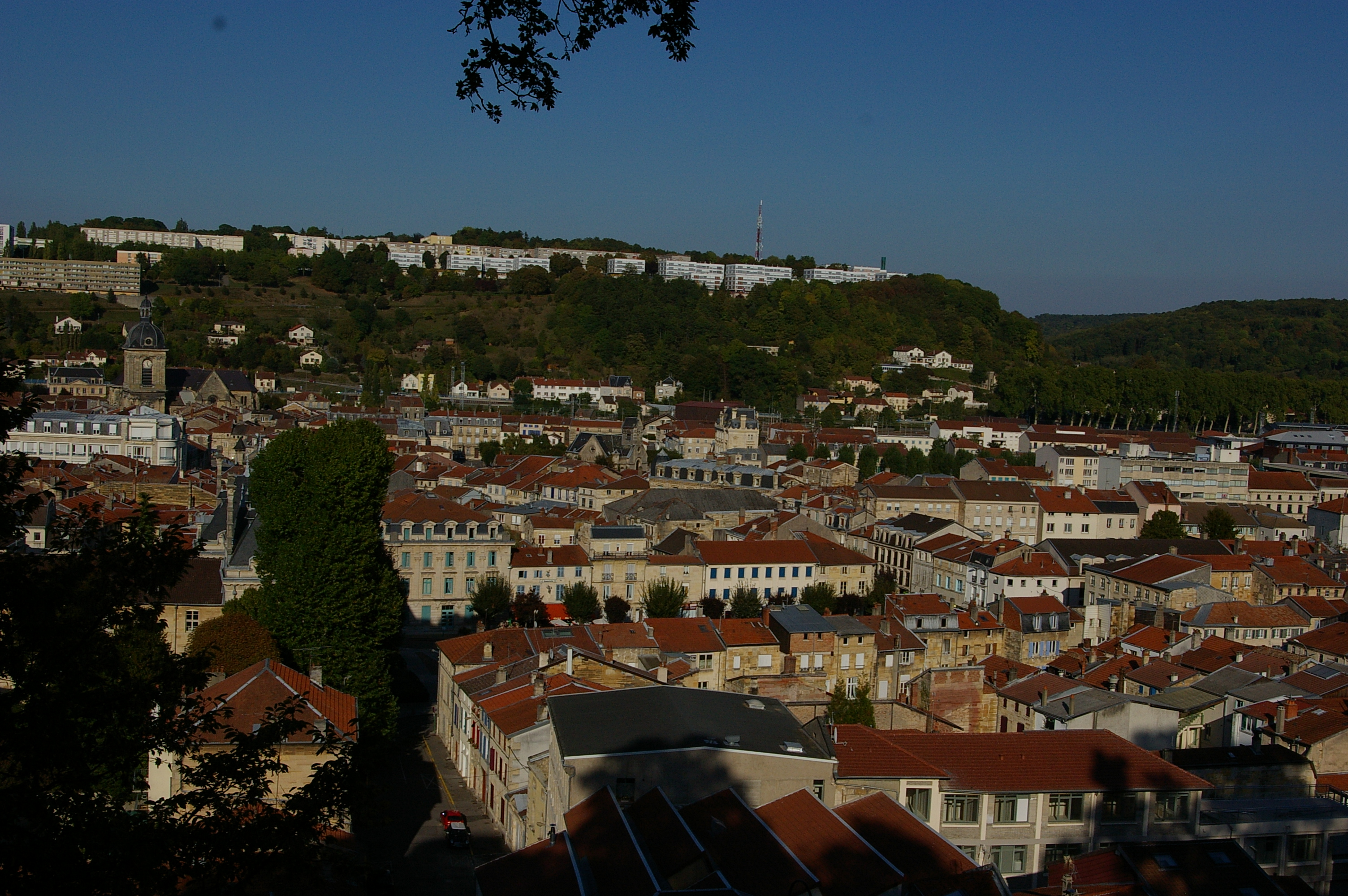 Vue depuis l'esplanade du chateau